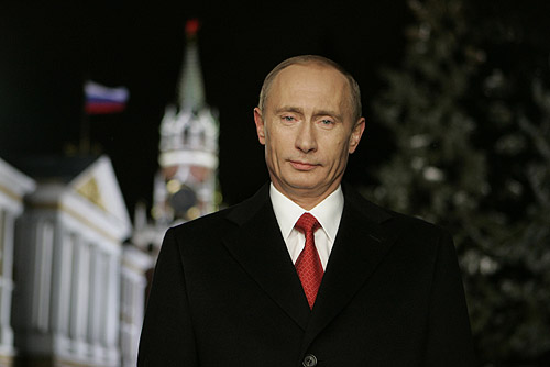 МОСКВА, КРЕМЛЬ. Новогоднее обращение к гражданам России.